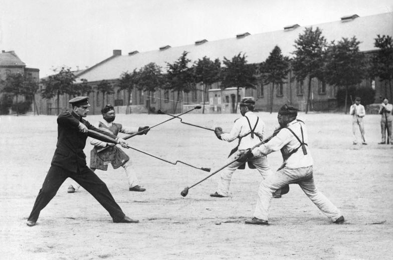 1. Weltkrieg 1914-1918 Kasernenhof - Fechten